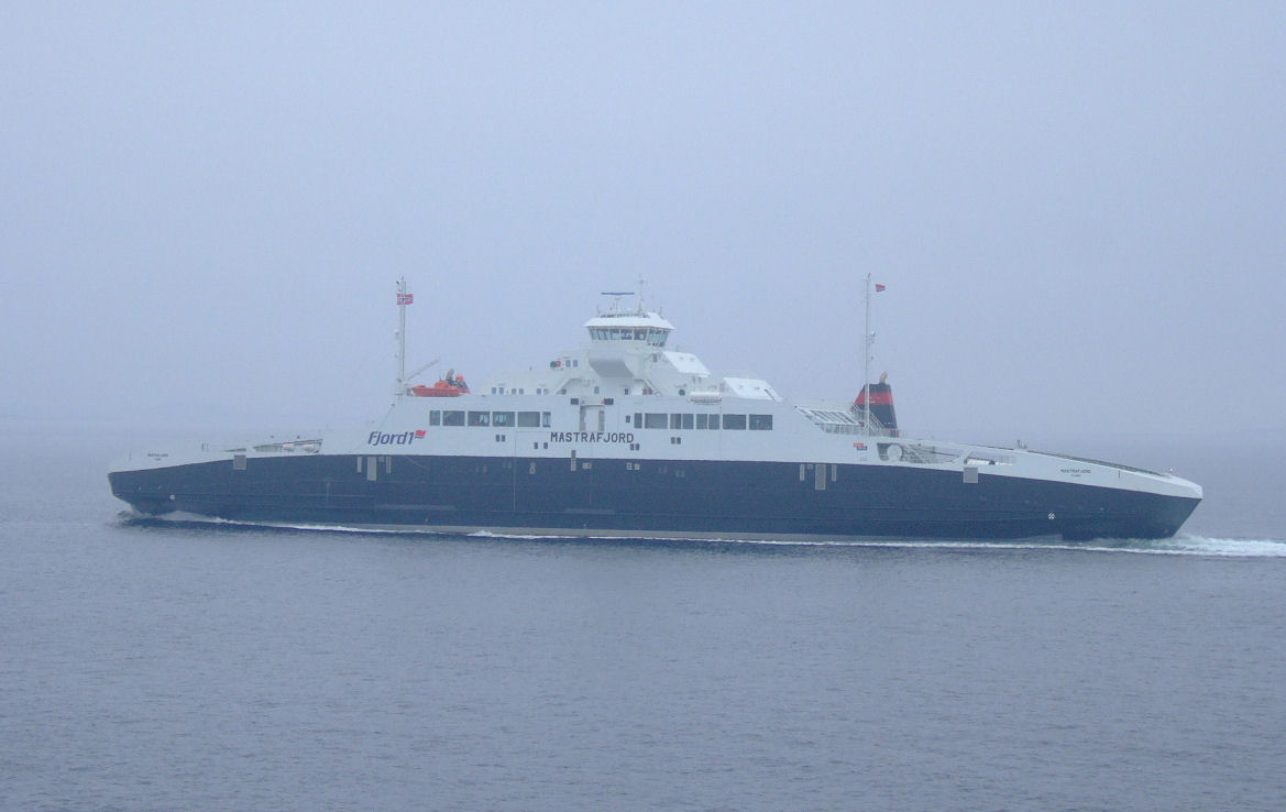 Mastrafjord in fog